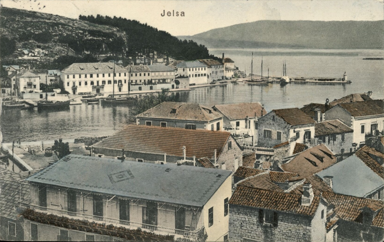 Jelsa, pohled na přístav.